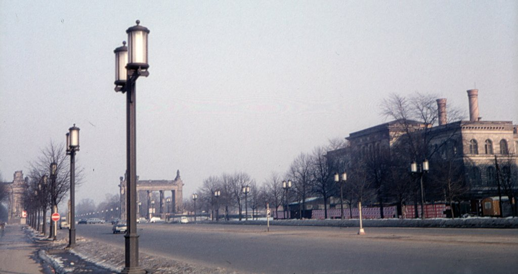 Straße des 17. Juni Richtung Charlottenburger Tor 1965 mit von Albert Speer entworfenen Laternen